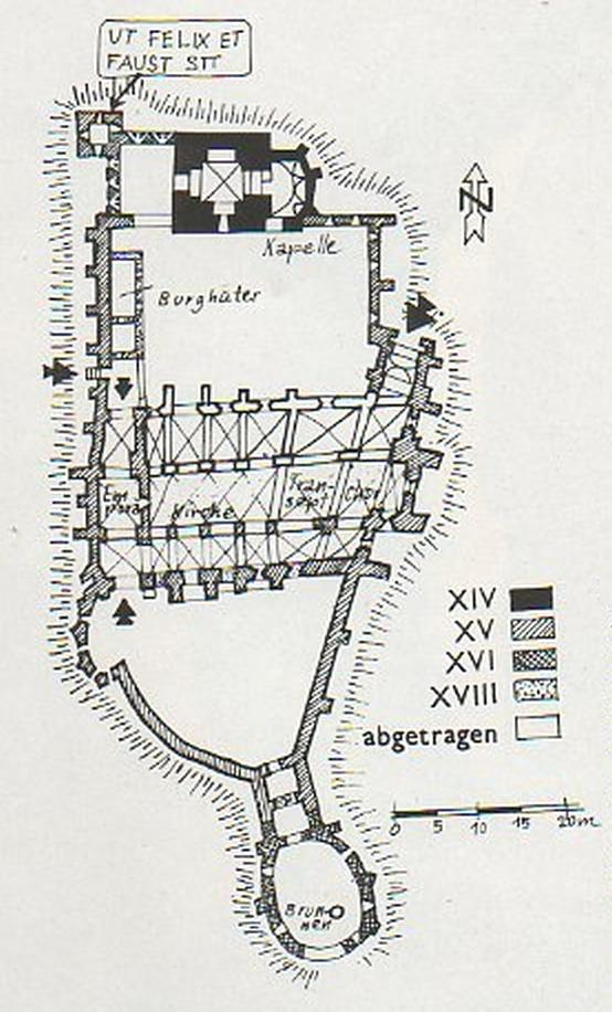 Planul fortificatiei din Slimnic.